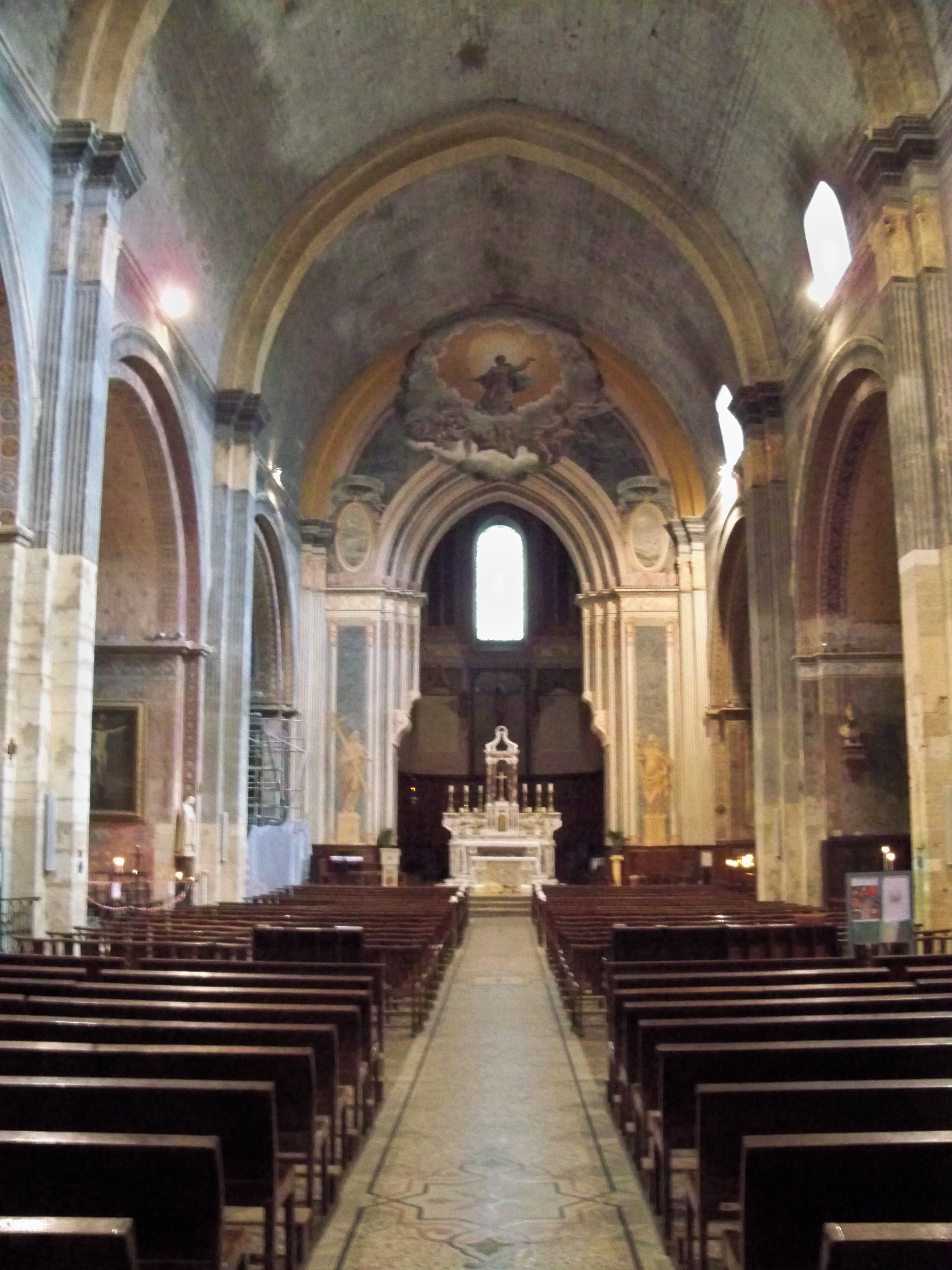 Nef de la cathédrale Notre Dame de Nazareth à Orange, Vaucluse, France